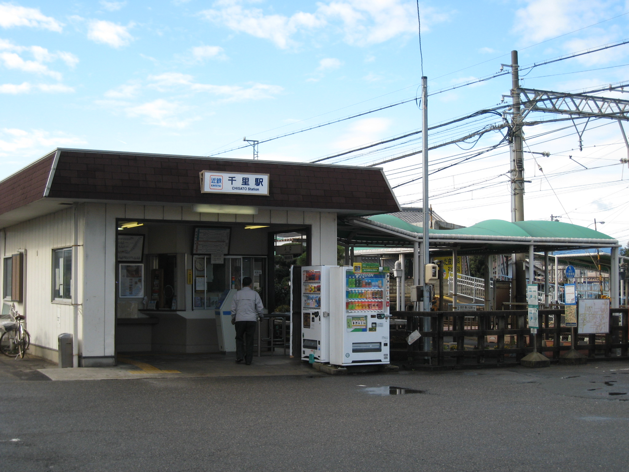 近鉄・千里駅